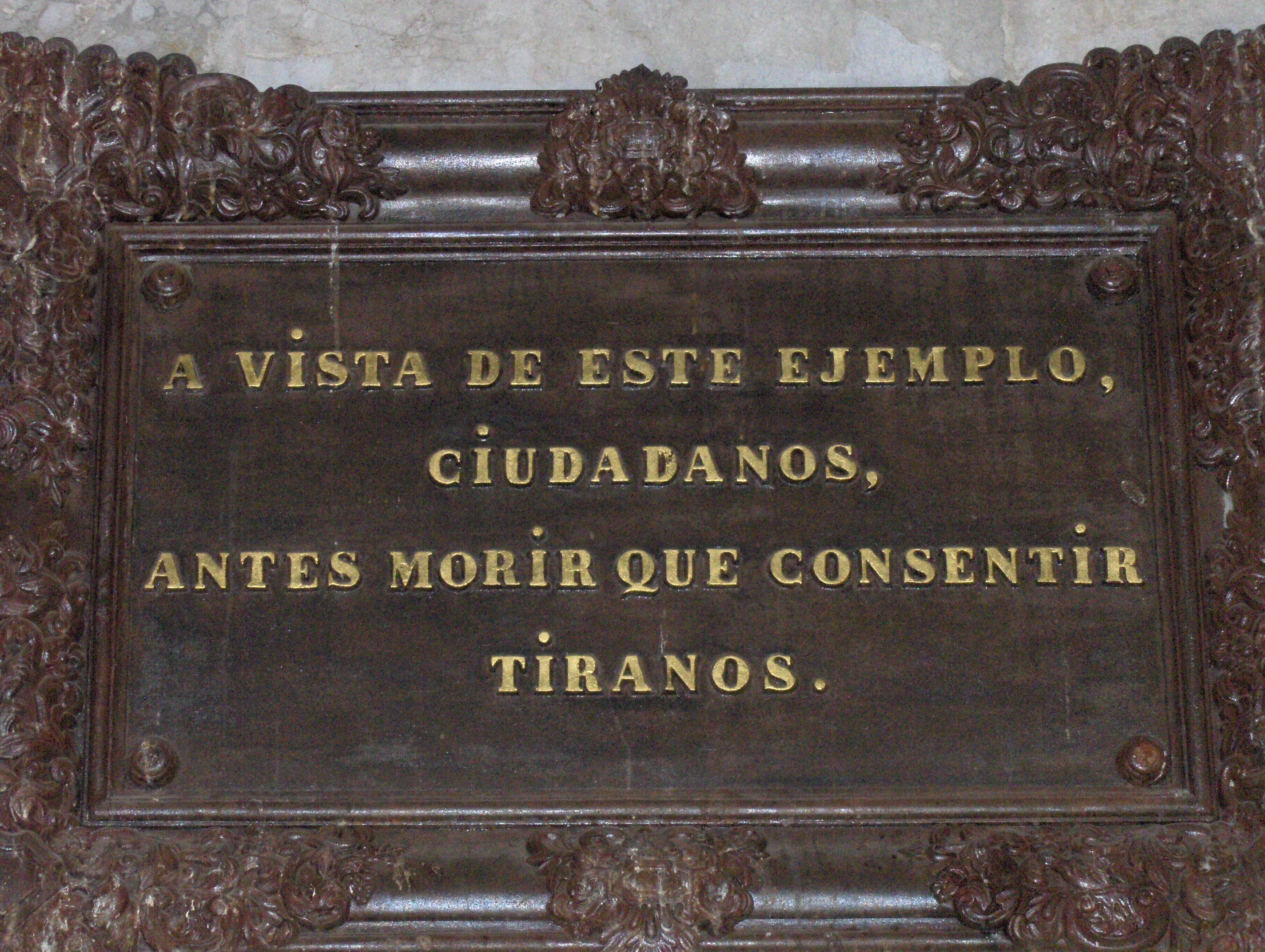 Placa del pedestal del monumento de Torrijos, Málaga, España.